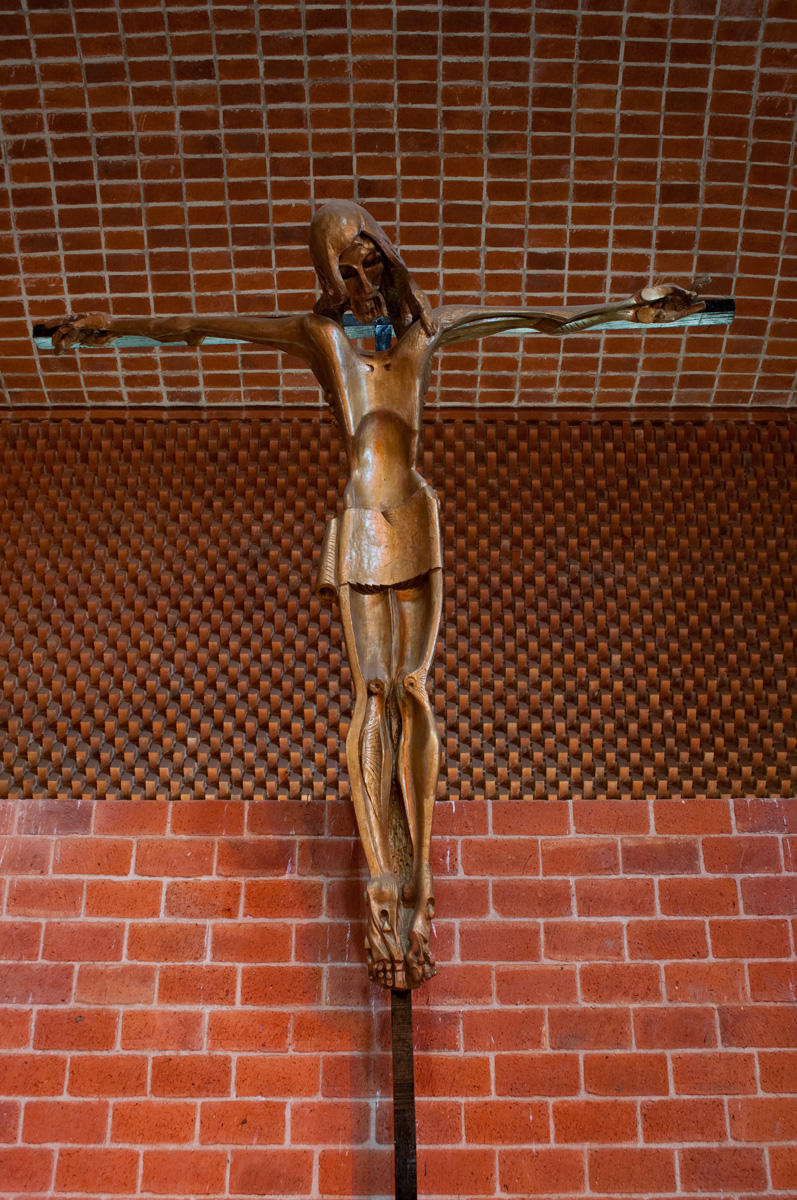 Iglesia de Cristo Obrero y Nuestra Señora de Lourdes. Ubicada en el departamento de Canelones